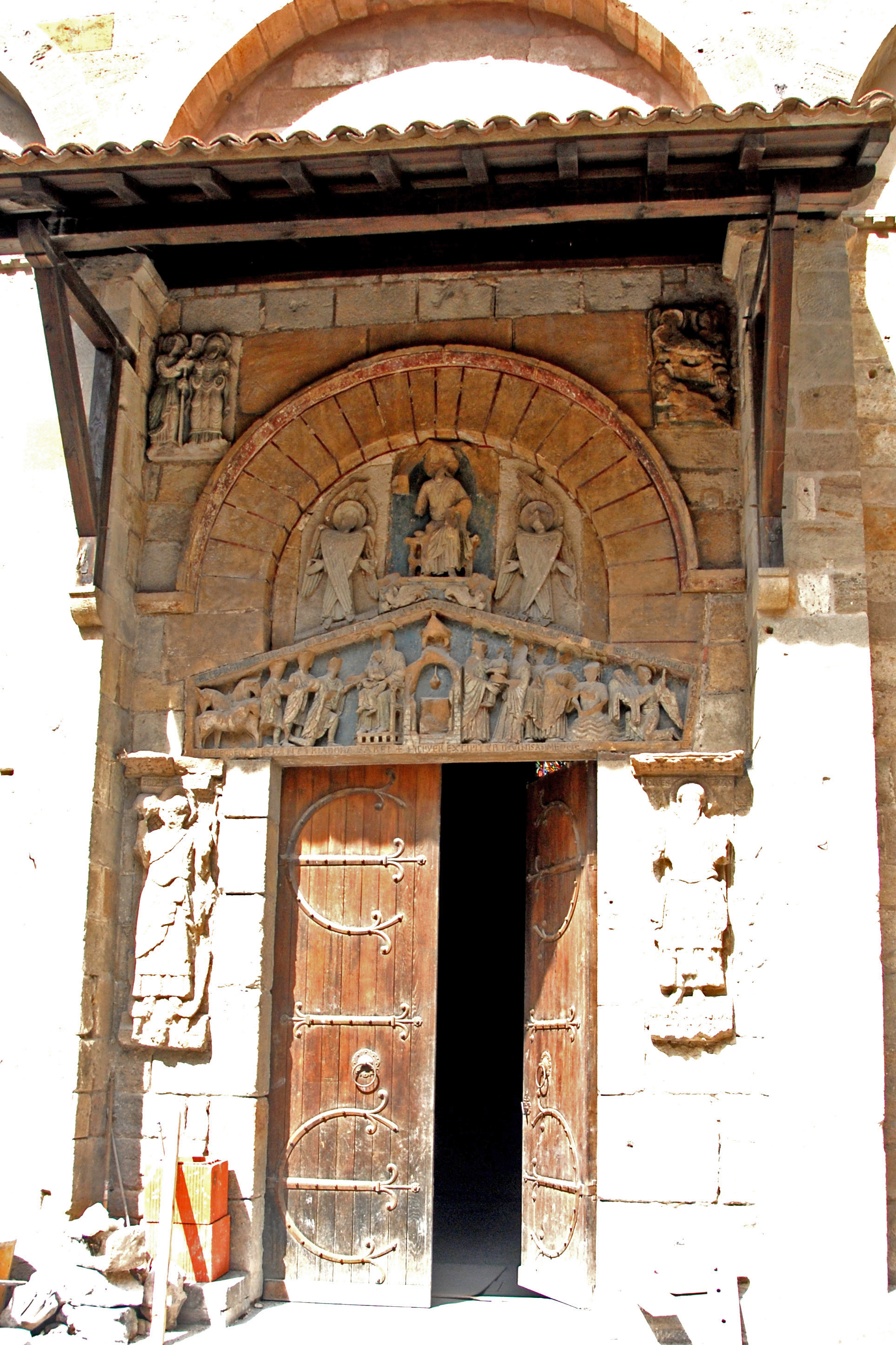 Notre-Dame du Port, Südportal Übersicht